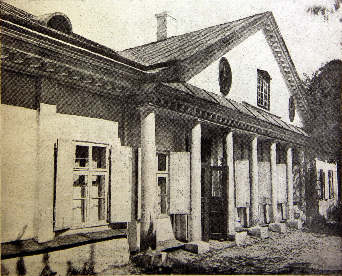 Беларуская (тарашкевіца): Менск (Miensk), вуліца Валоцкая (vulica Vałockaja). Палац Ваньковічаў (Vańkovič)